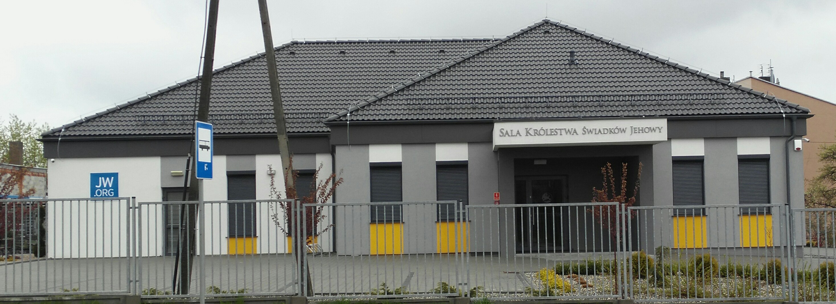 Jedna z sal Świadków Jehowy w Tomaszowie Mazowieckim. Ulica Jagieillońska 1